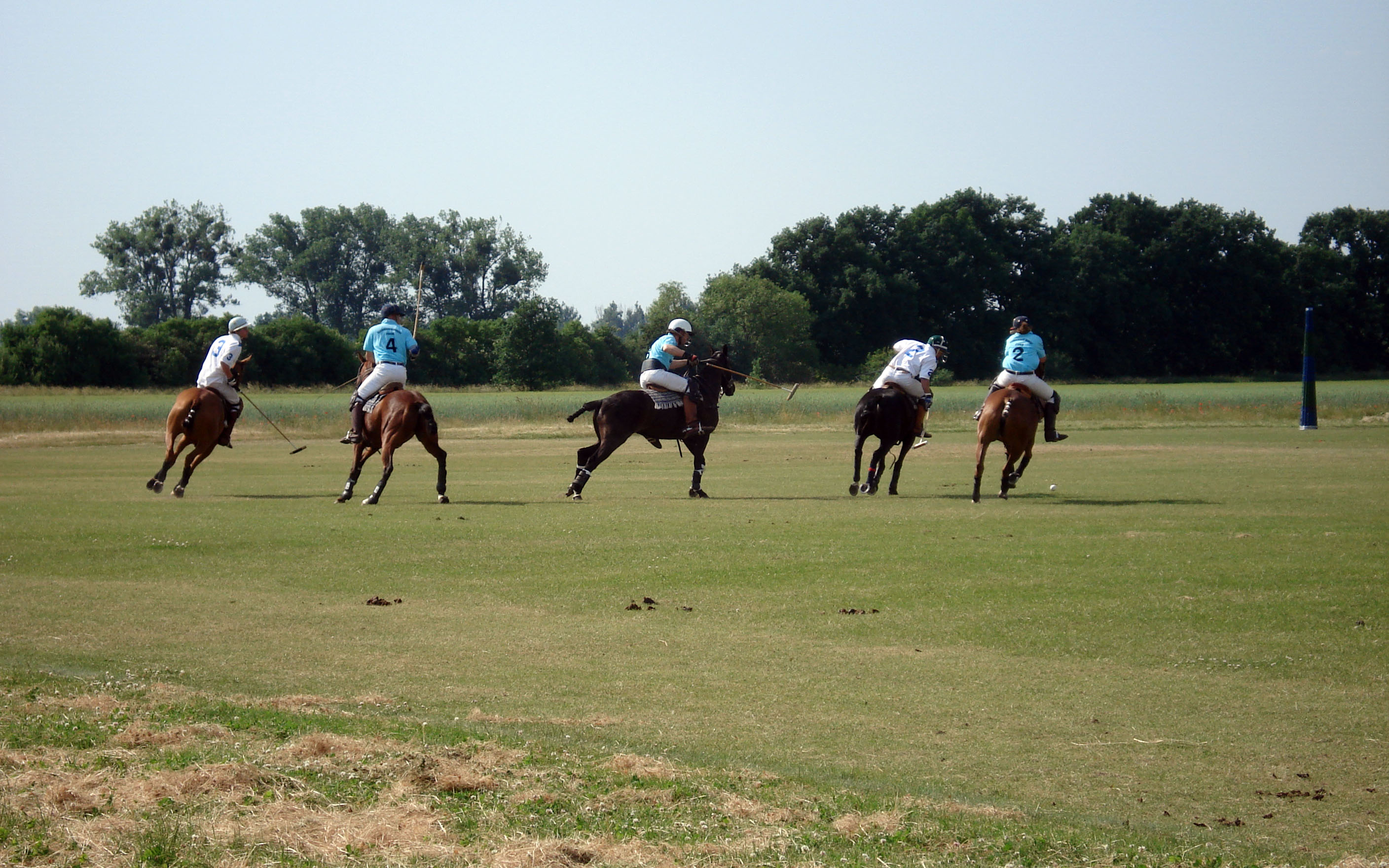 Attack scene